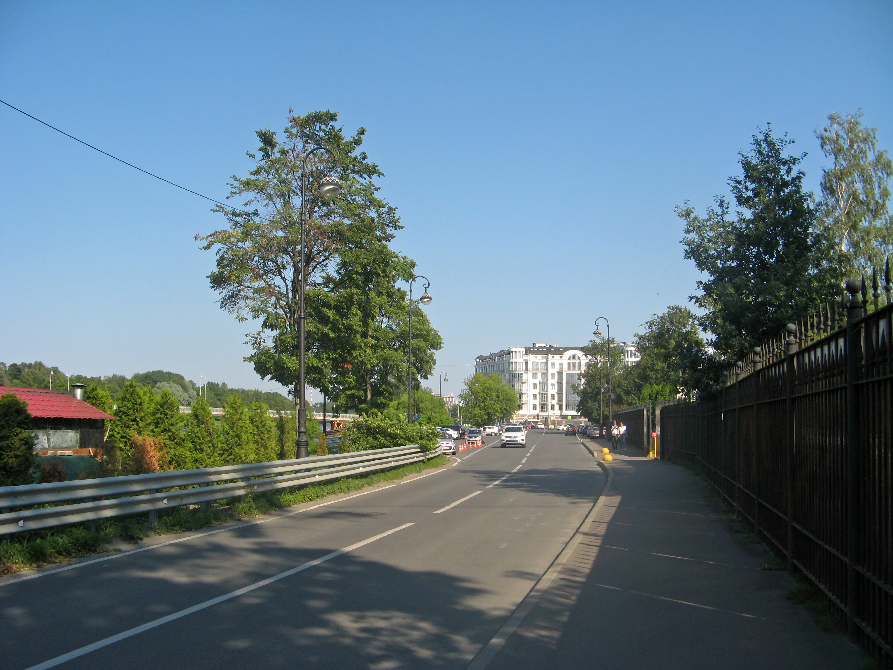 Набережная Мартынова, Санкт-Петербург